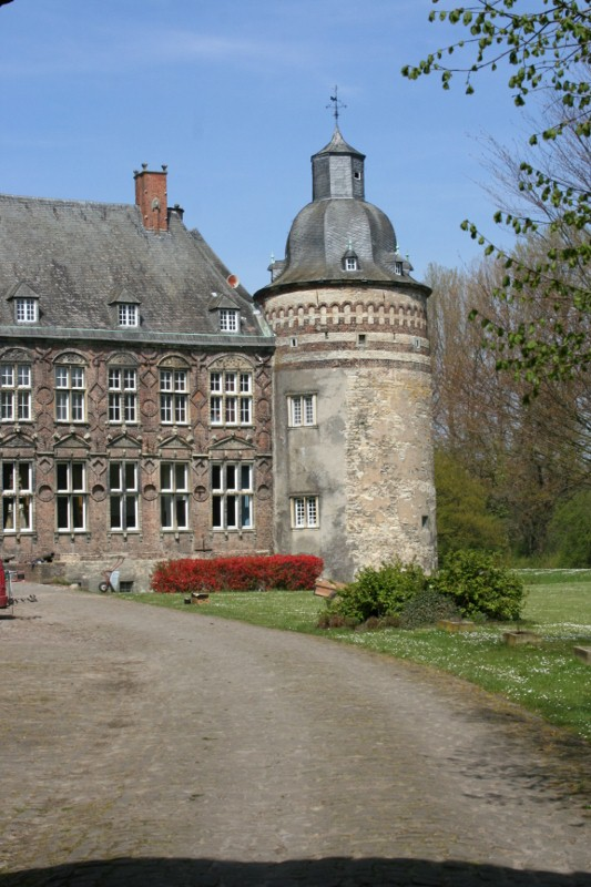 Haus Assen ist ein Wasserschloss im Stil der Lipperenaissance in Lippborg, Deutschland